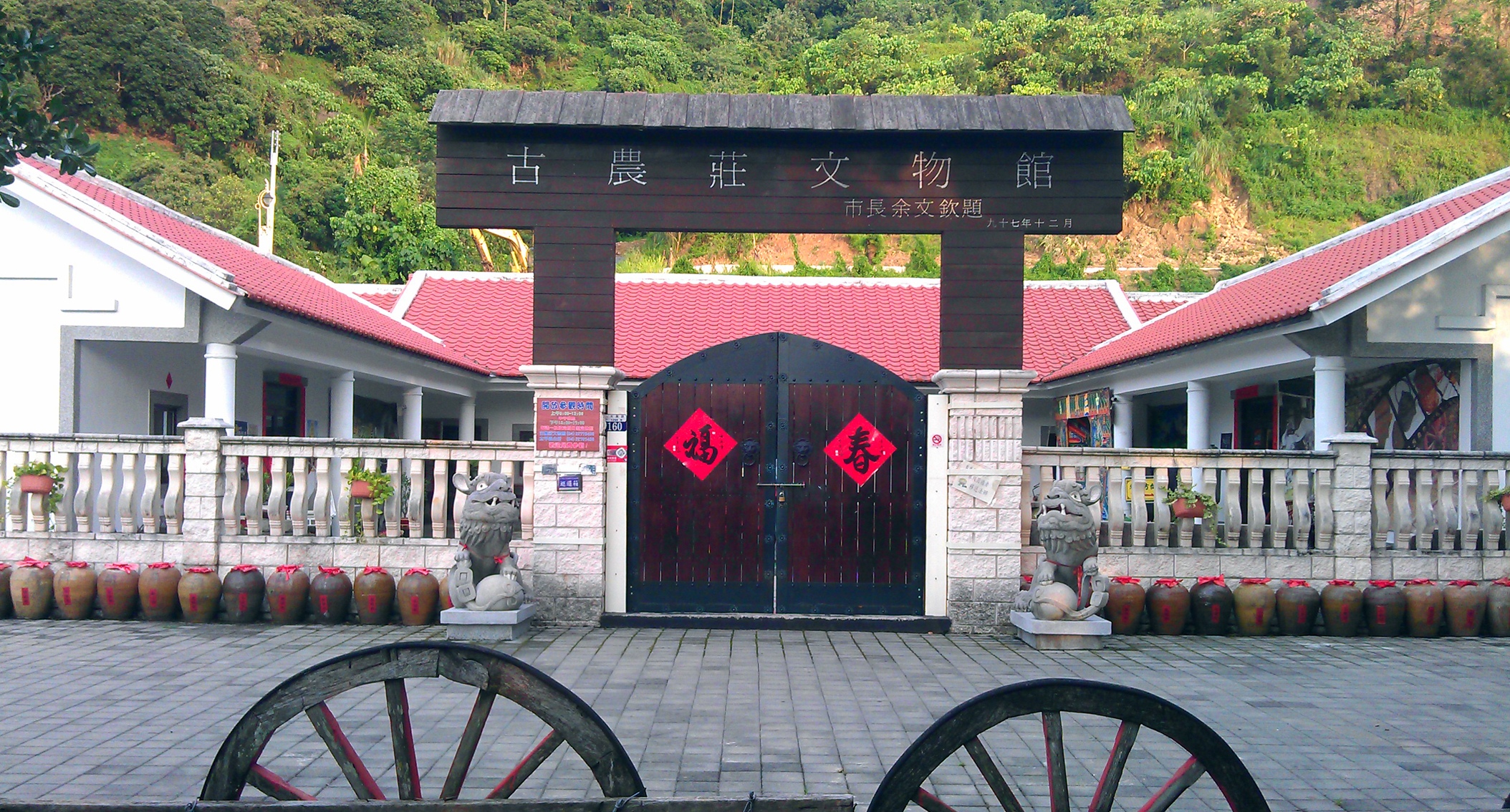 中文（台灣）: 太平古農莊文物館